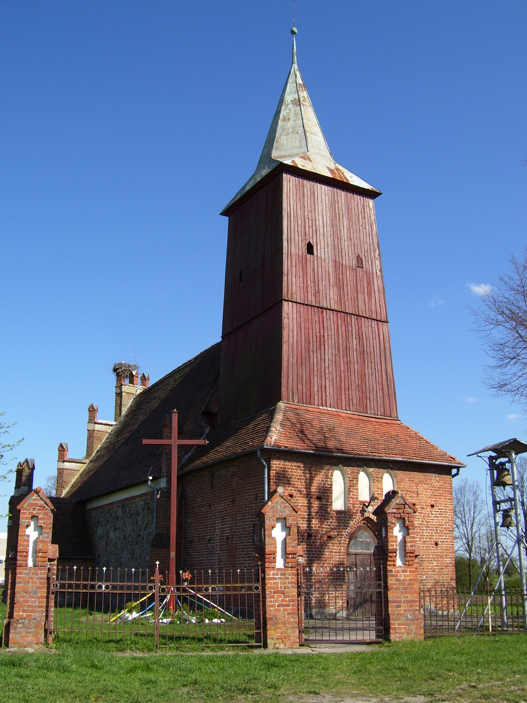 Dzietrzychowo - kościół p.w. Matki Boskiej Różańcowej (zabytek nr rejestr. A-729)